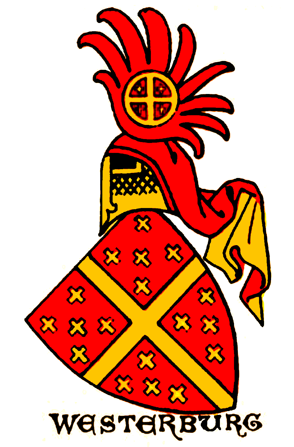 Stammwappen der Edelfreien Herren zu Westerburg